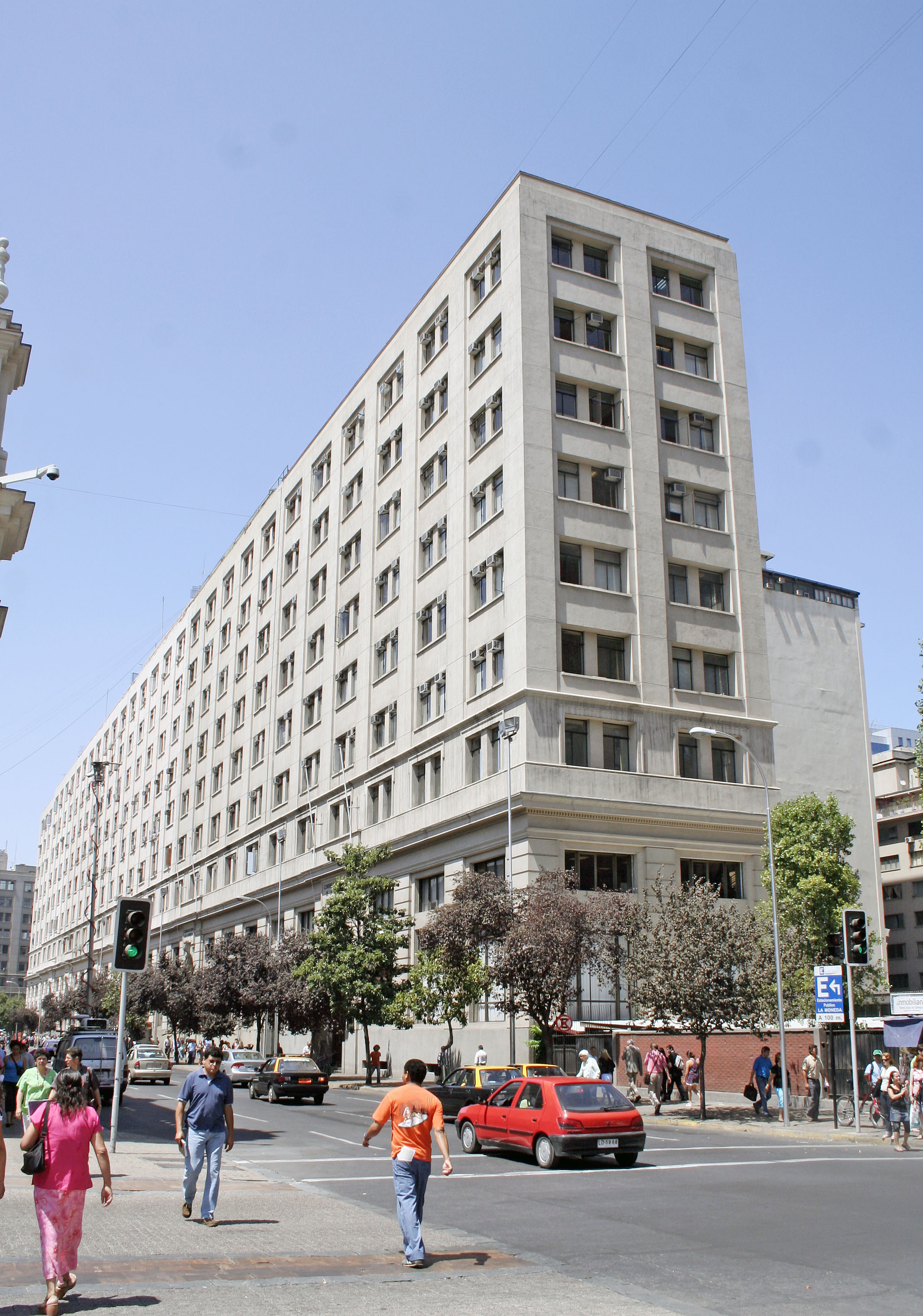 Fachada edificio CGR=Contraloria General de la Republica